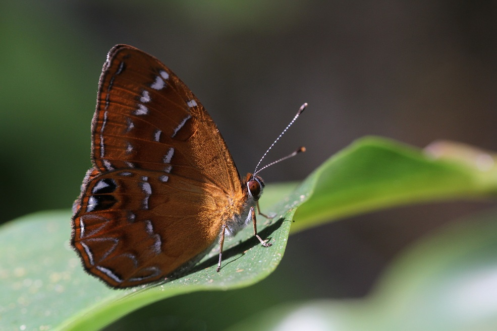 學名:Abisara burnii etymander 拍攝時間:2013/2/23 拍攝地點:蓮華池